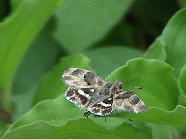 Marbled Skipper, Gomalia elma (Trimen, 1862)